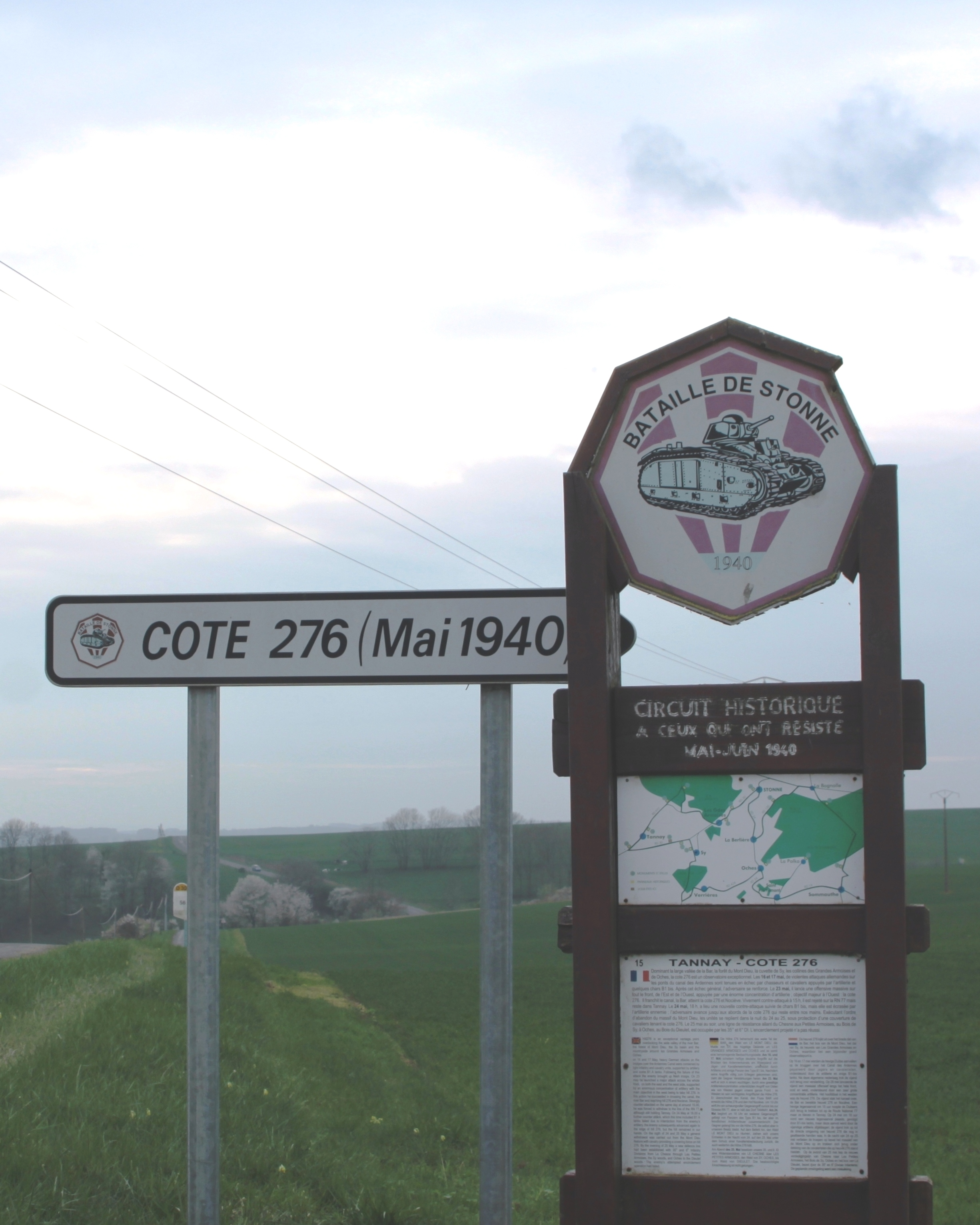 Panneau op der Cote276